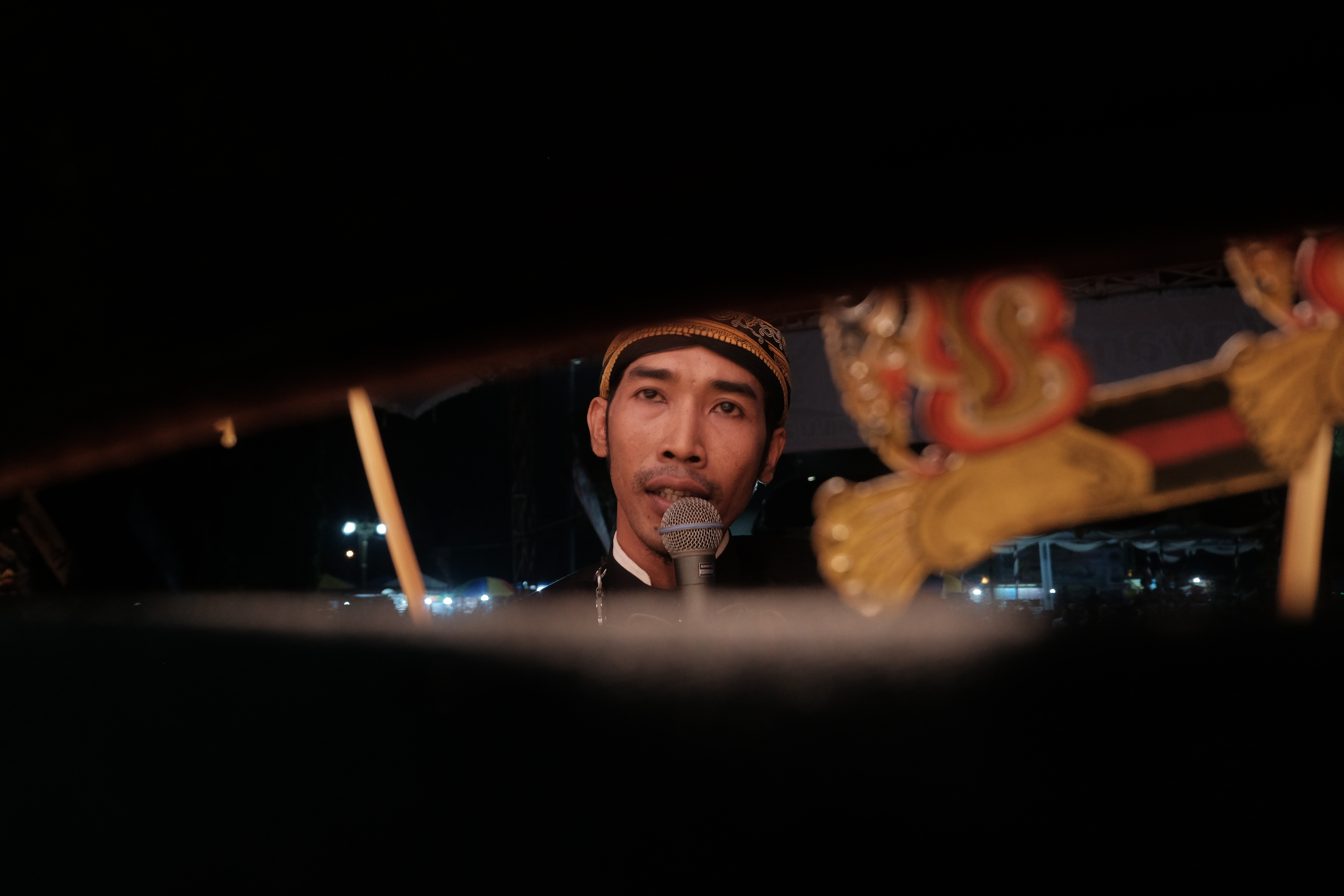 Dalang (ngudal piwulang) merupakan salah seorang yang menjalankan wayang kulit. DAlang melakukan fungsinya sebagai pengatur pertunjukkan wayang kulit secara keseluruhan. Ia menjadi sutradara, memerankan suara semua tokoh dalam lakon wayang, memandu pengiring musik pentas wayang.